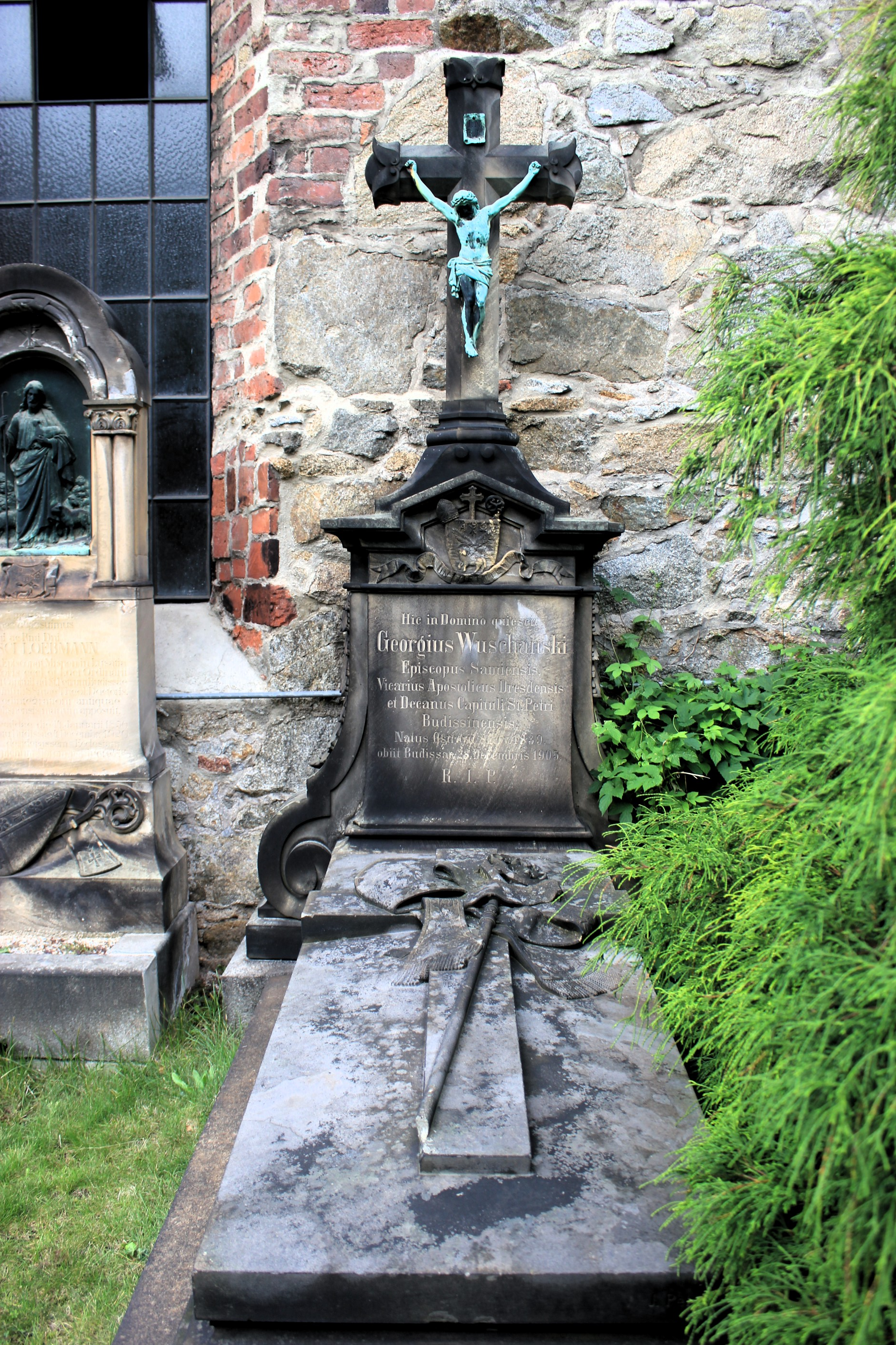 Hornjoserbsce: Row Jurja Łusčanskeho na Budyskim Mikławšku.